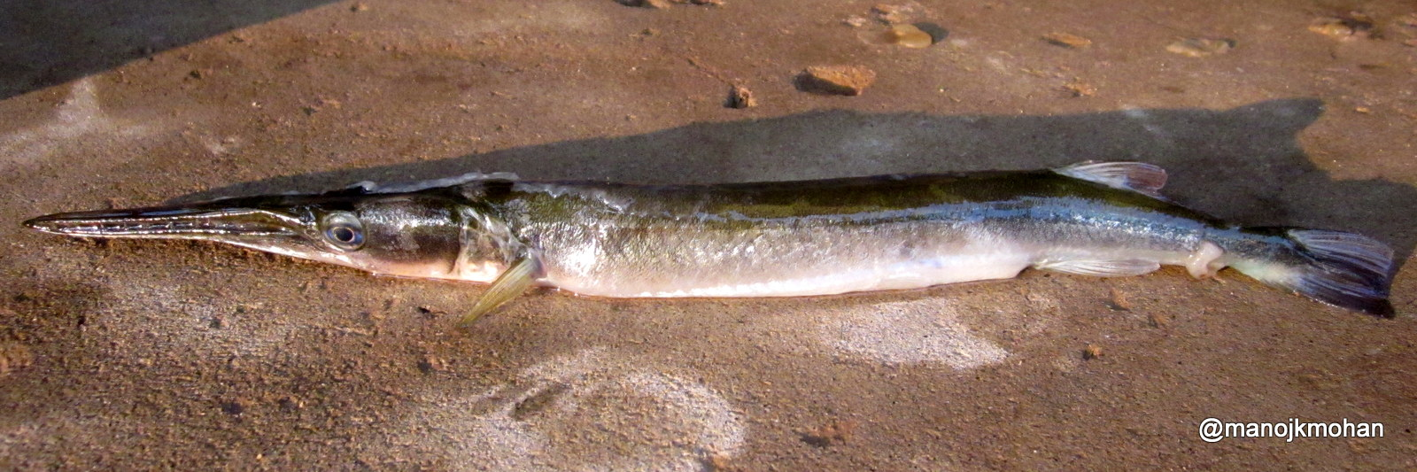 പുഴകളിലും കുളങ്ങളിലും കനാലുകളിലും മറ്റും സാധാരണയായി കണ്ടുവരുന്ന ഒരു ശുദ്ധജലമത്സ്യമാണ് കോലാൻ (freshwater garfish). ശാസ്ത്രനാമം : Xenentodon cancila From Chalakudy River